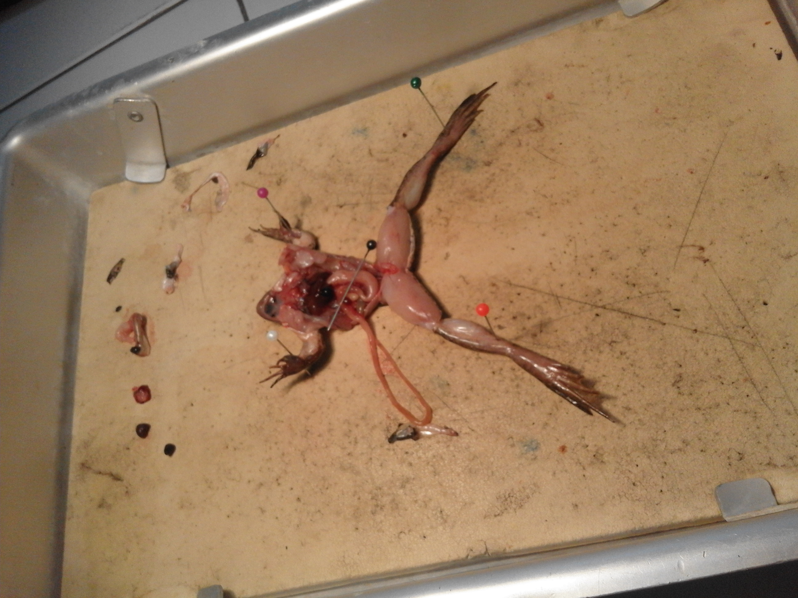 صورة توضح ضفدع أثناء تشريحه بكلية العلوم والتقنيات في فاس (المغرب)